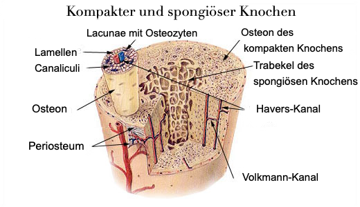 Histologische Darstellung